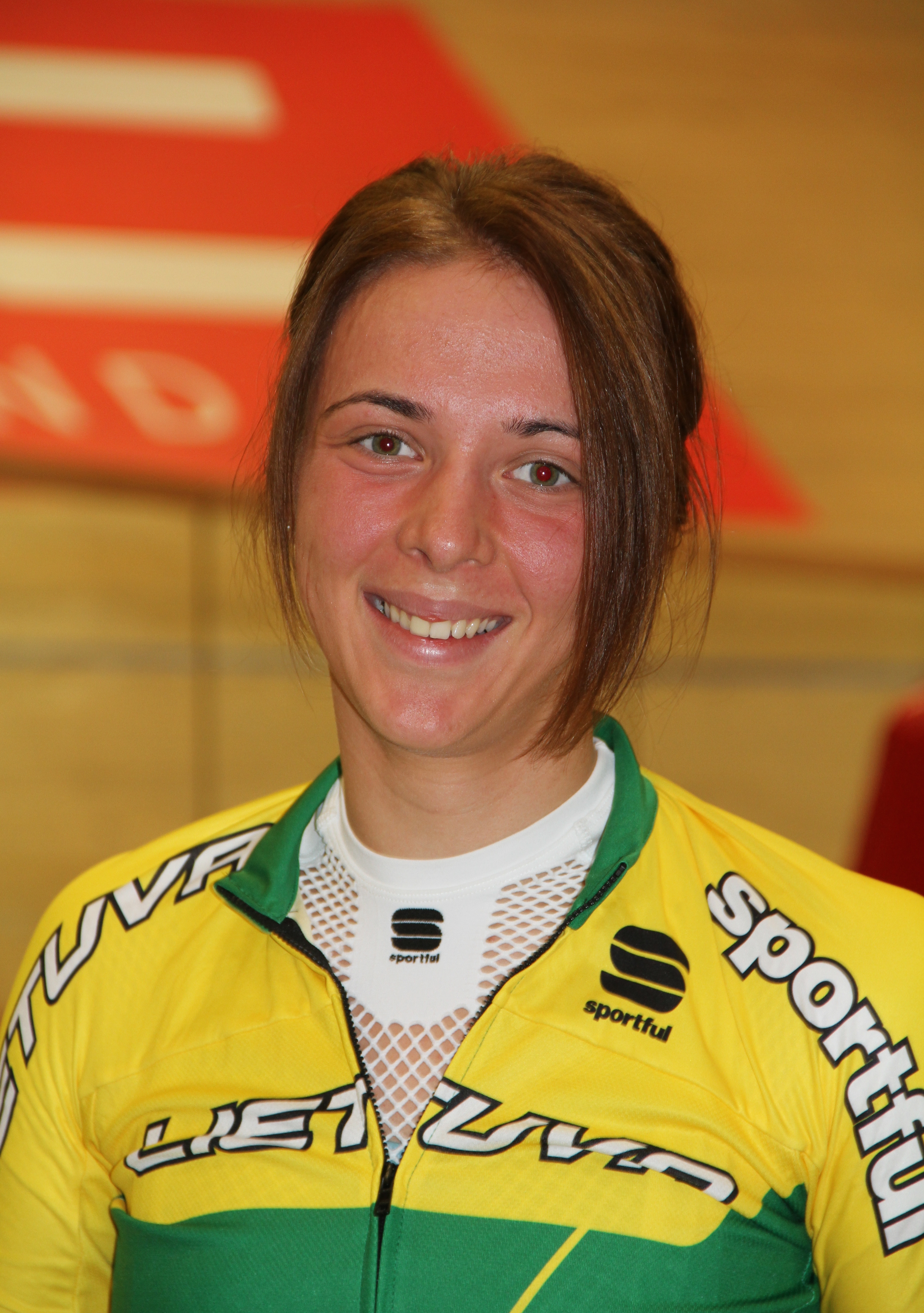 Edita Mazureviciute, litauische Radsportlerin The making of this document was supported by the Community-Budget of Wikimedia Germany.